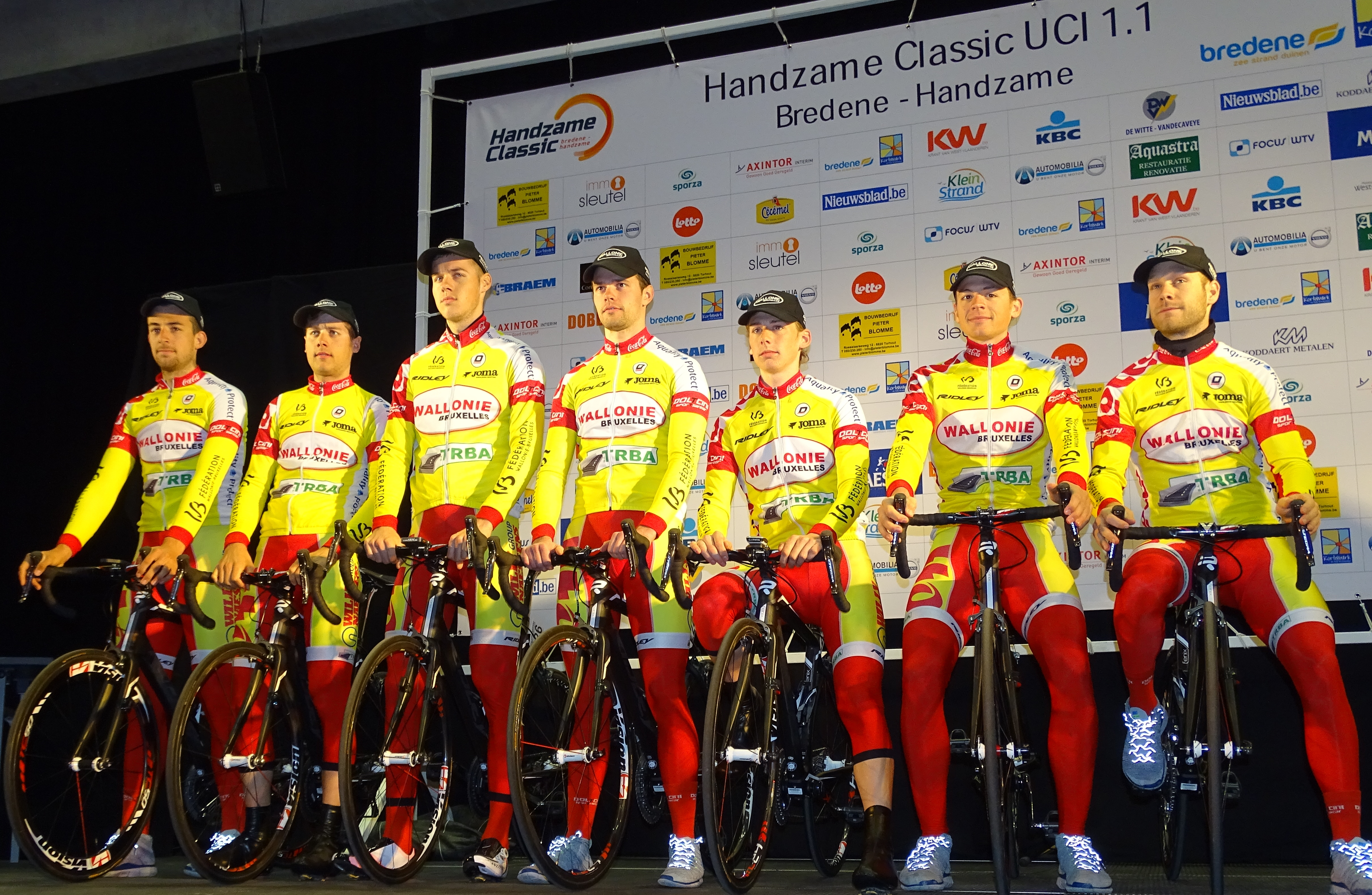 Reportage réalisé le vendredi 20 mars à l'occasion du départ de la Handzame Classic 2015 à Bredene, Belgique.